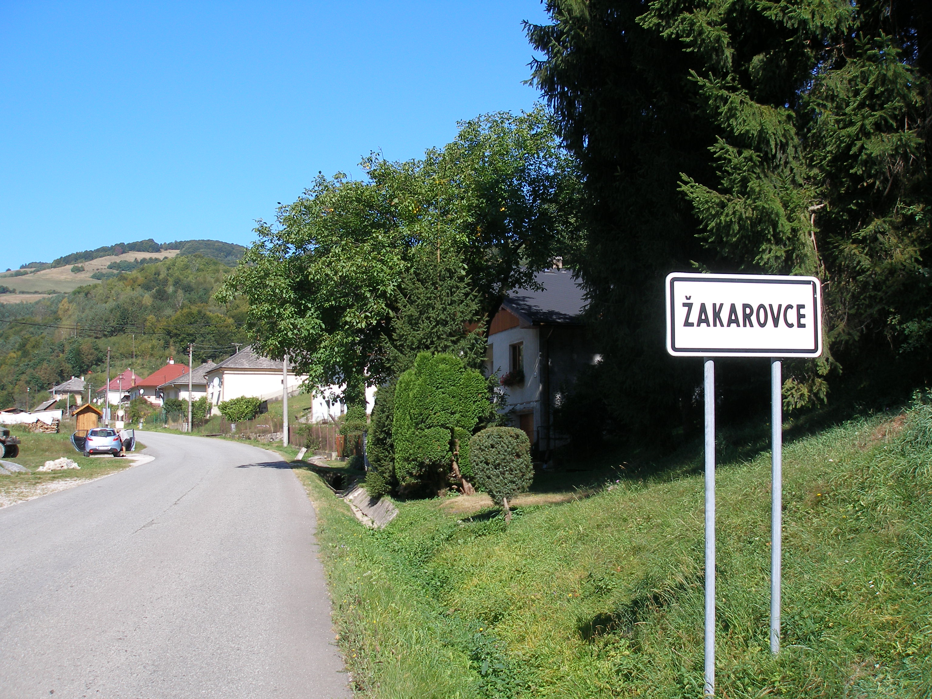 Spišská obec Žakarovce. Okres Gelnica.